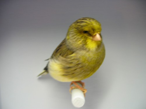 Mâle Gloster Consort 3/4 (Serinus canaria) panaché vert